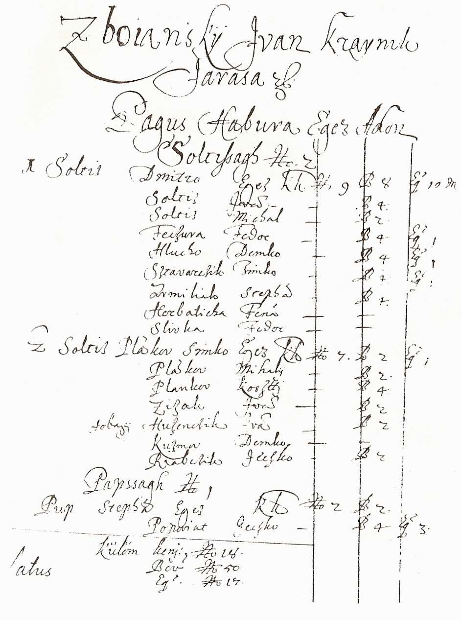 Prvá strana súpisu poddanských domácností v urbári z roku 1657 opis: Súpis poddaných v Habure zdroj: Habura v rokoch 1818 - 1993